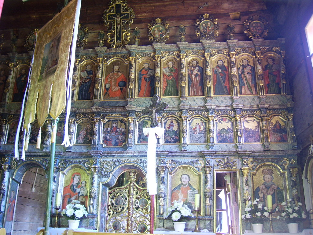 Gréckokatolícky drevený chrám svätého Mikuláša, 1658, NKP